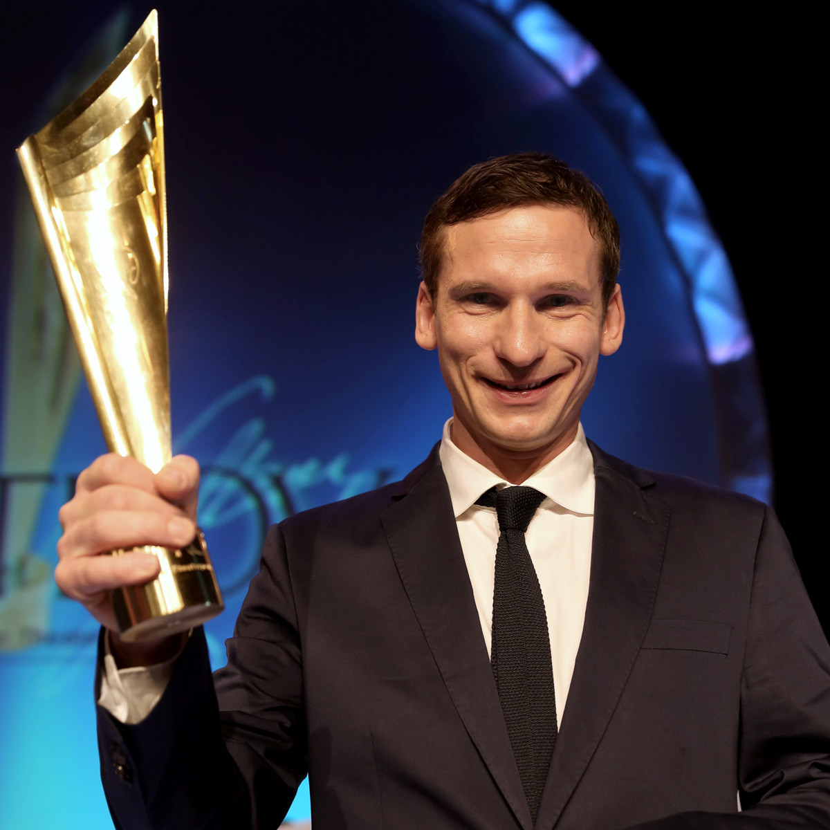 Till Firit - Nestroy-Theaterpreis 2013 in der Halle F der Wiener Stadthalle (Wien, Österreich).